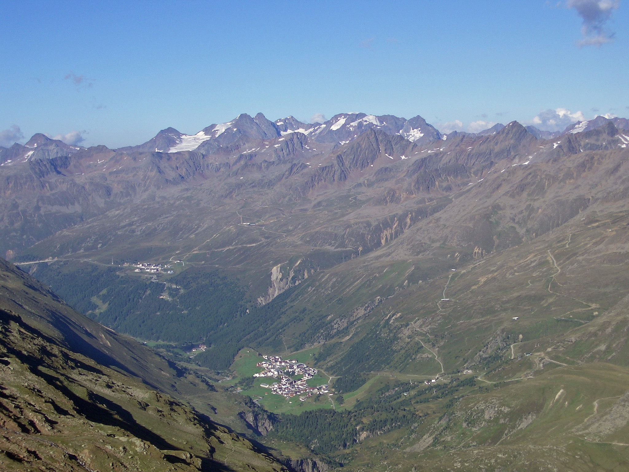 Obergurgl und Gurgler Tal vom Anstiegsweg zum Ramolhaus. Im Hintergrund die Stubaier Alpen.